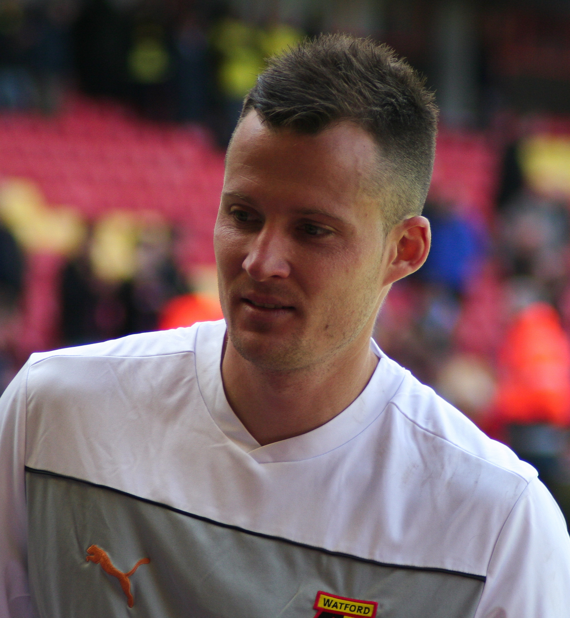 Dániel Tőzsér